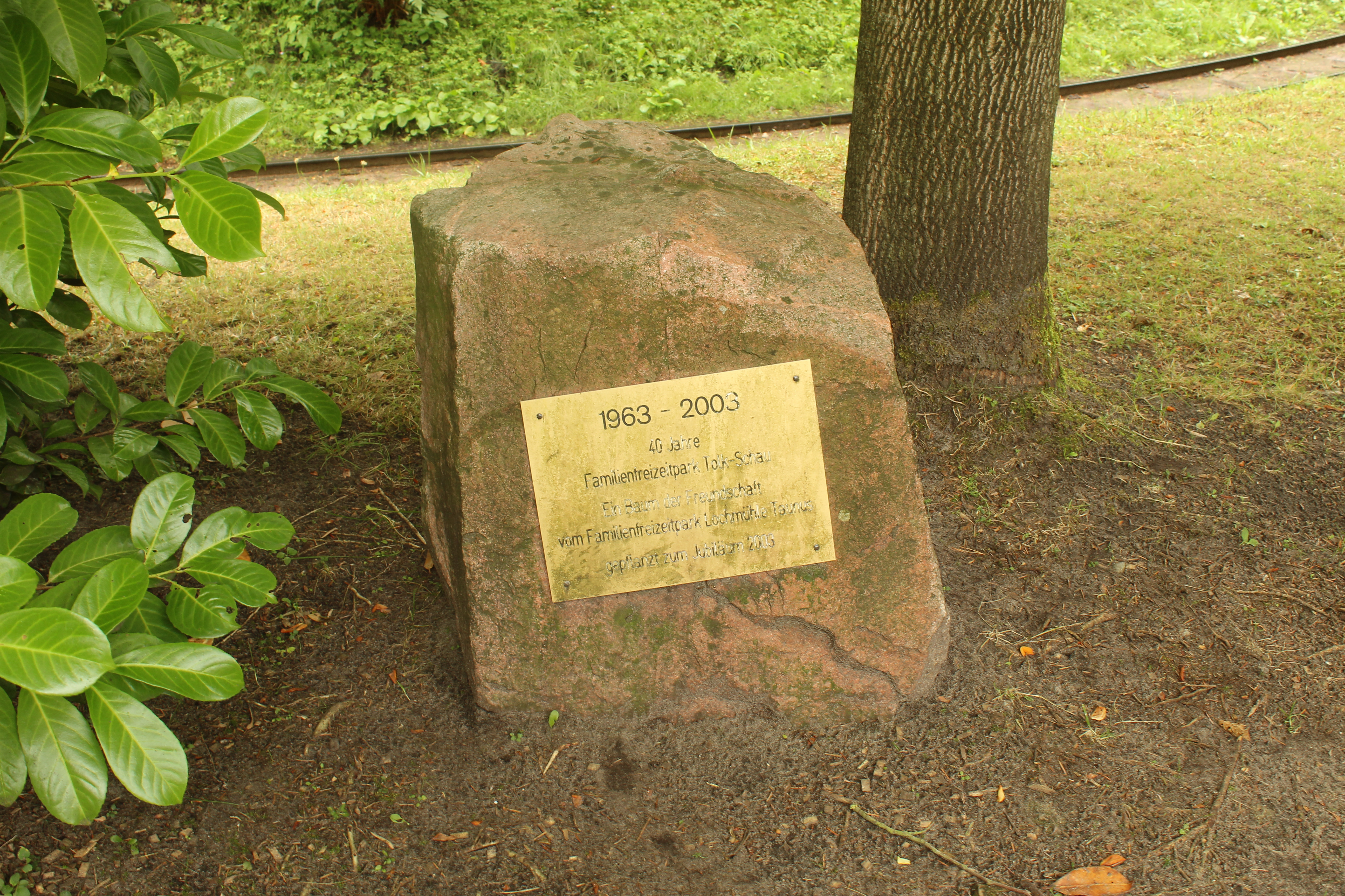 Jubiläumsstein 40 Jahre Tolk Schau